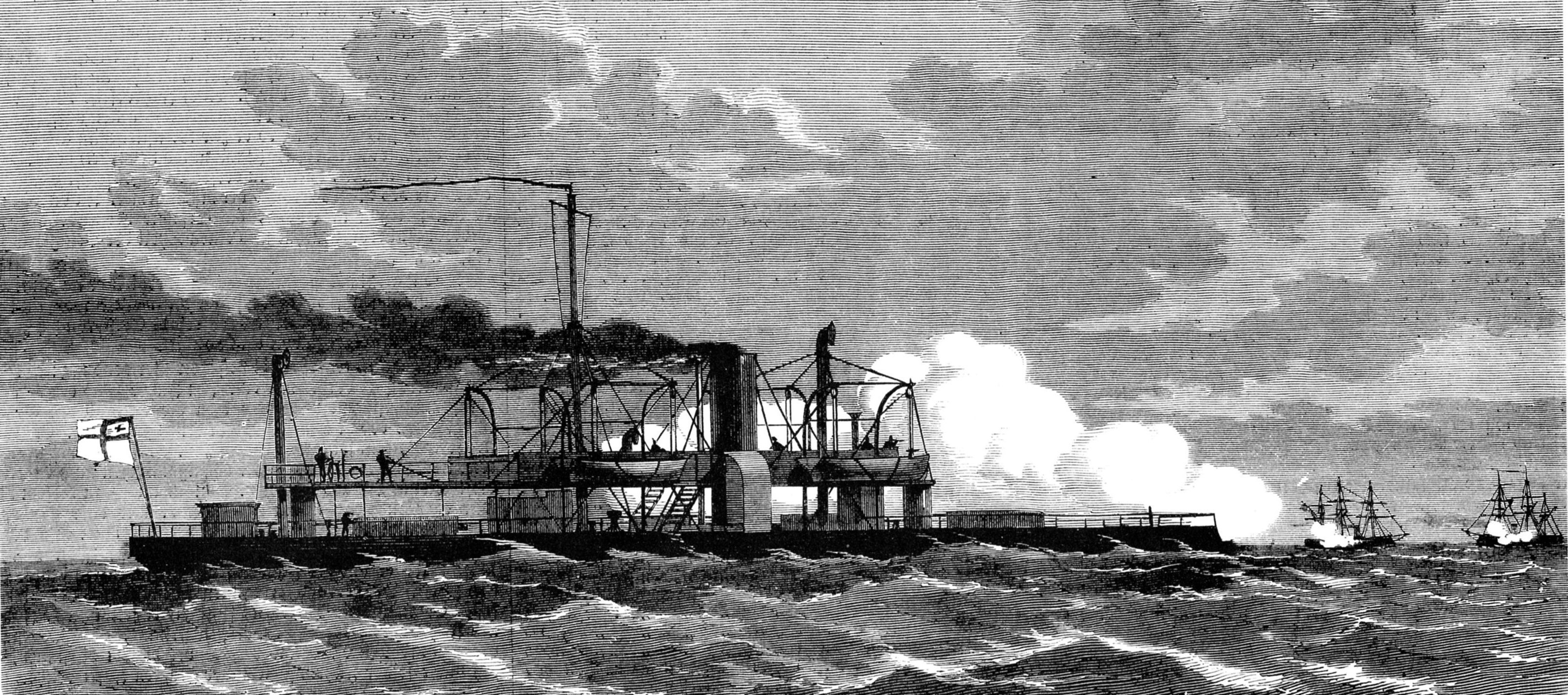 Norddeutsches Panzerschiff SMS ARMINIUS im Gefecht mit französischen Panzerschiffen vor der Wesermündung 24. August 1870. Zeitgenössische Darstellung